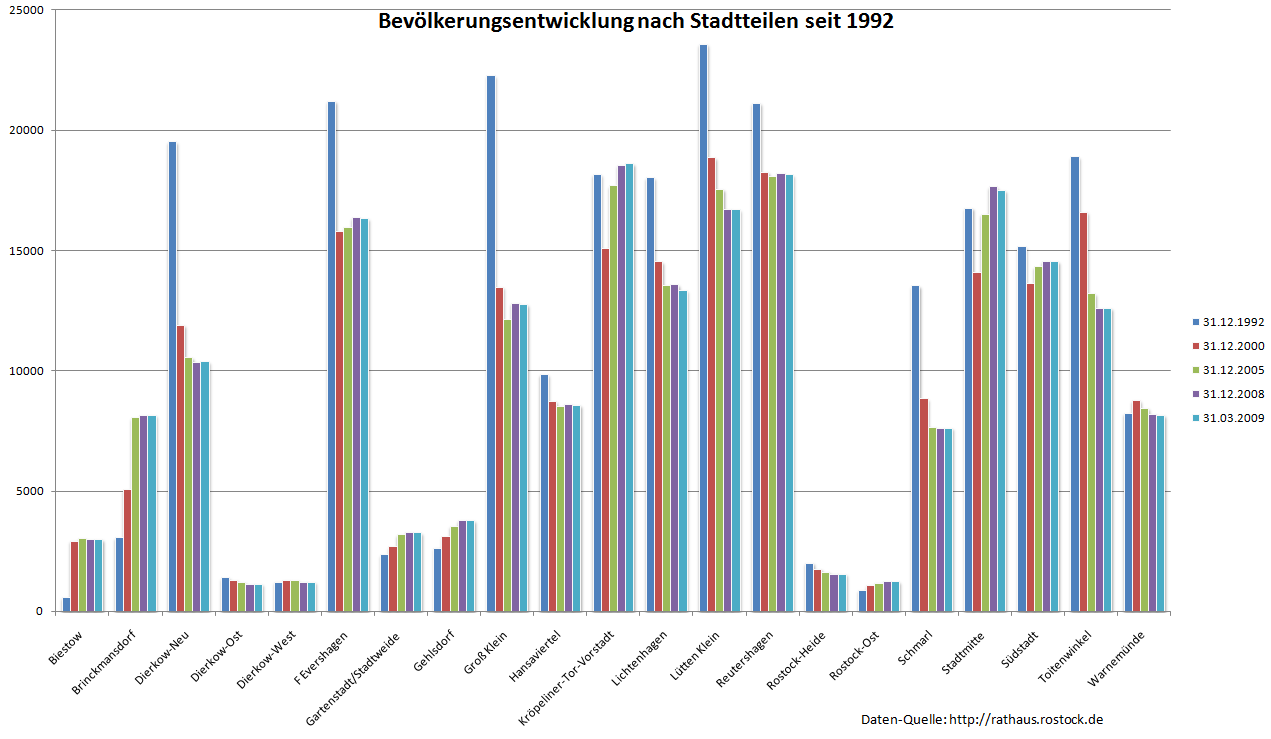 Bevölkerungsentwicklung in Rostock seit 1992 nach Stadtteilen